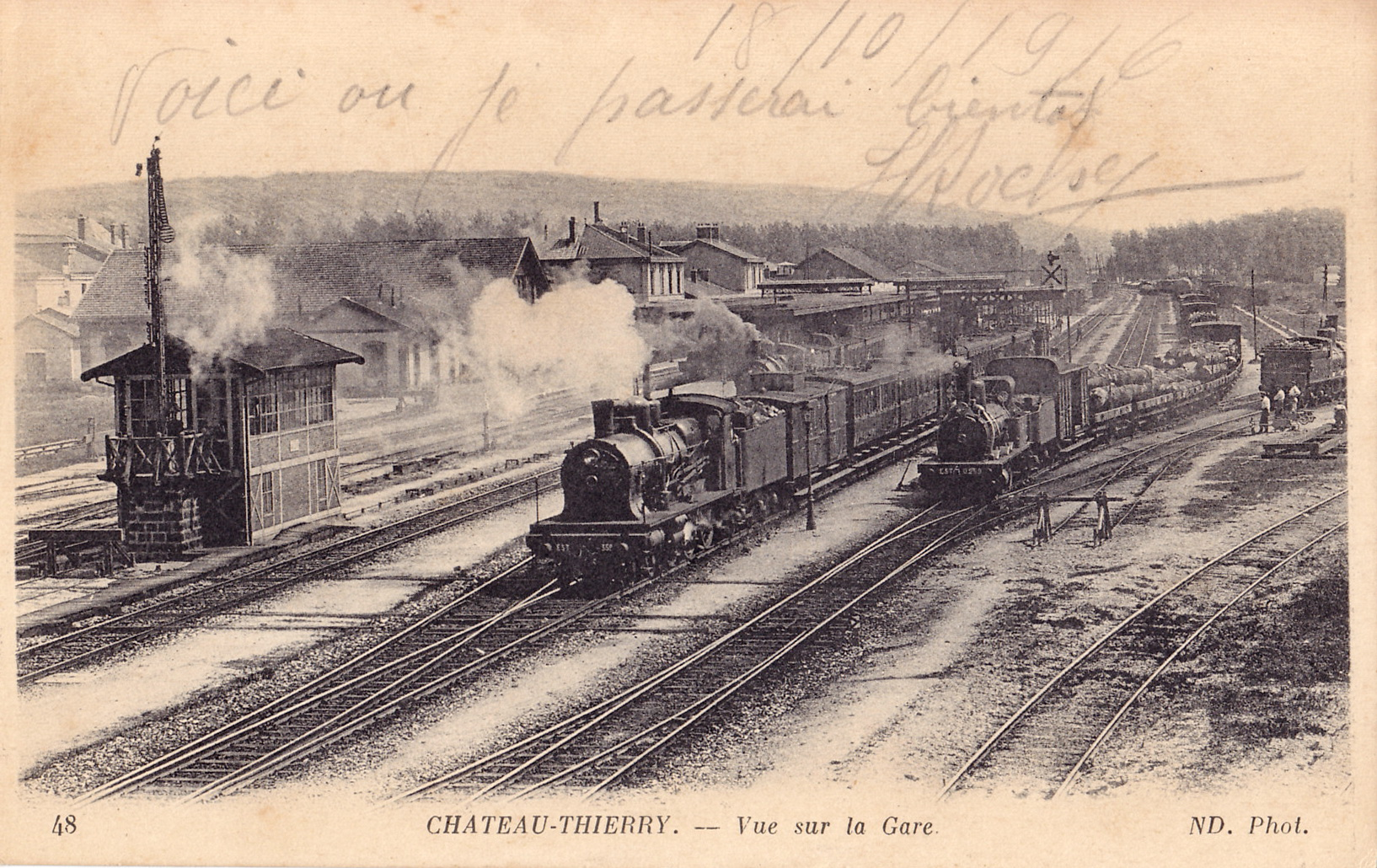 Carte postale ancienne éditée par ND, n°48 :CHÂTEAU-THIERRY - Vue sur la Gare